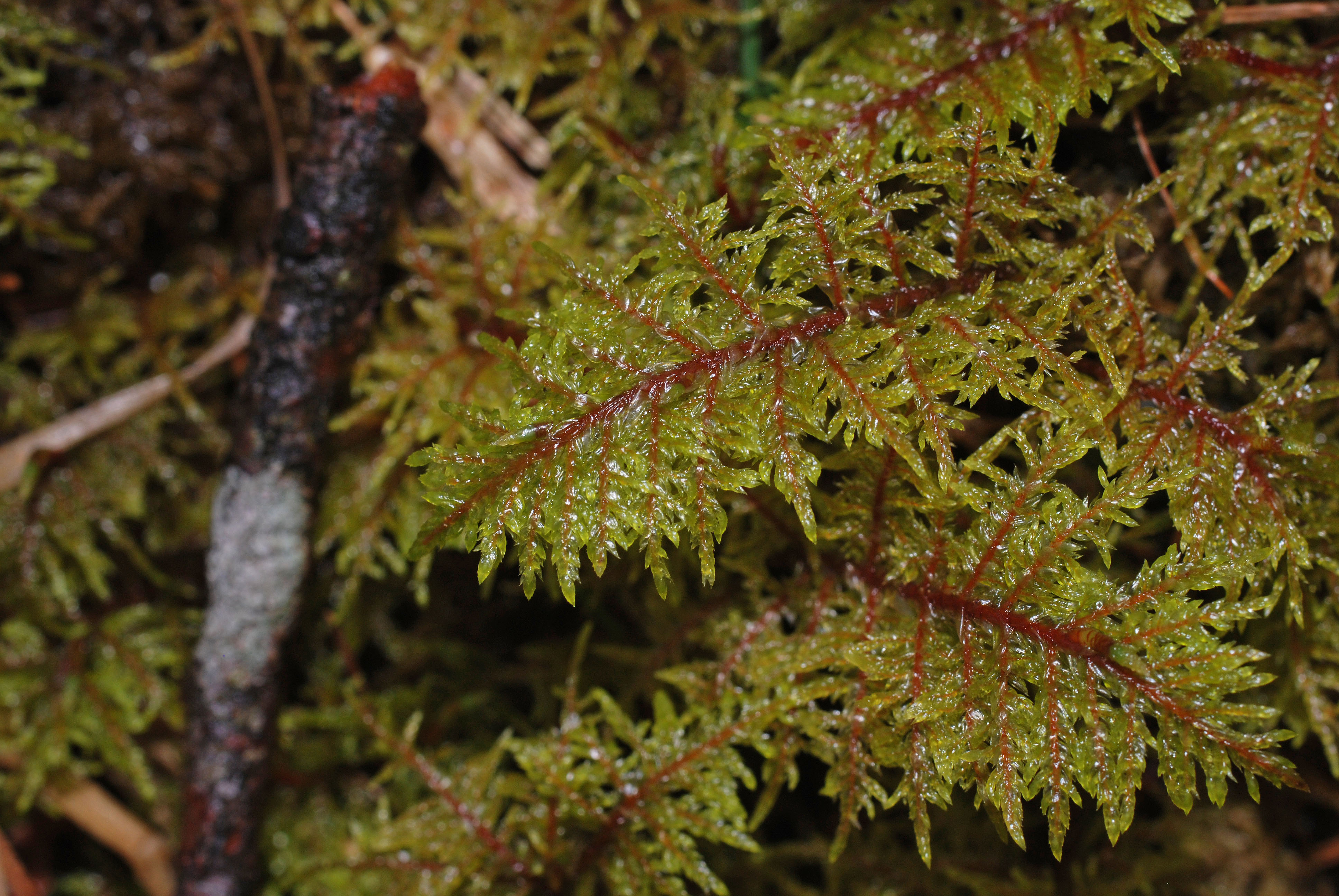 Hylocomium splendens, Schoberstein/Attersee, Upper Austria, Austria